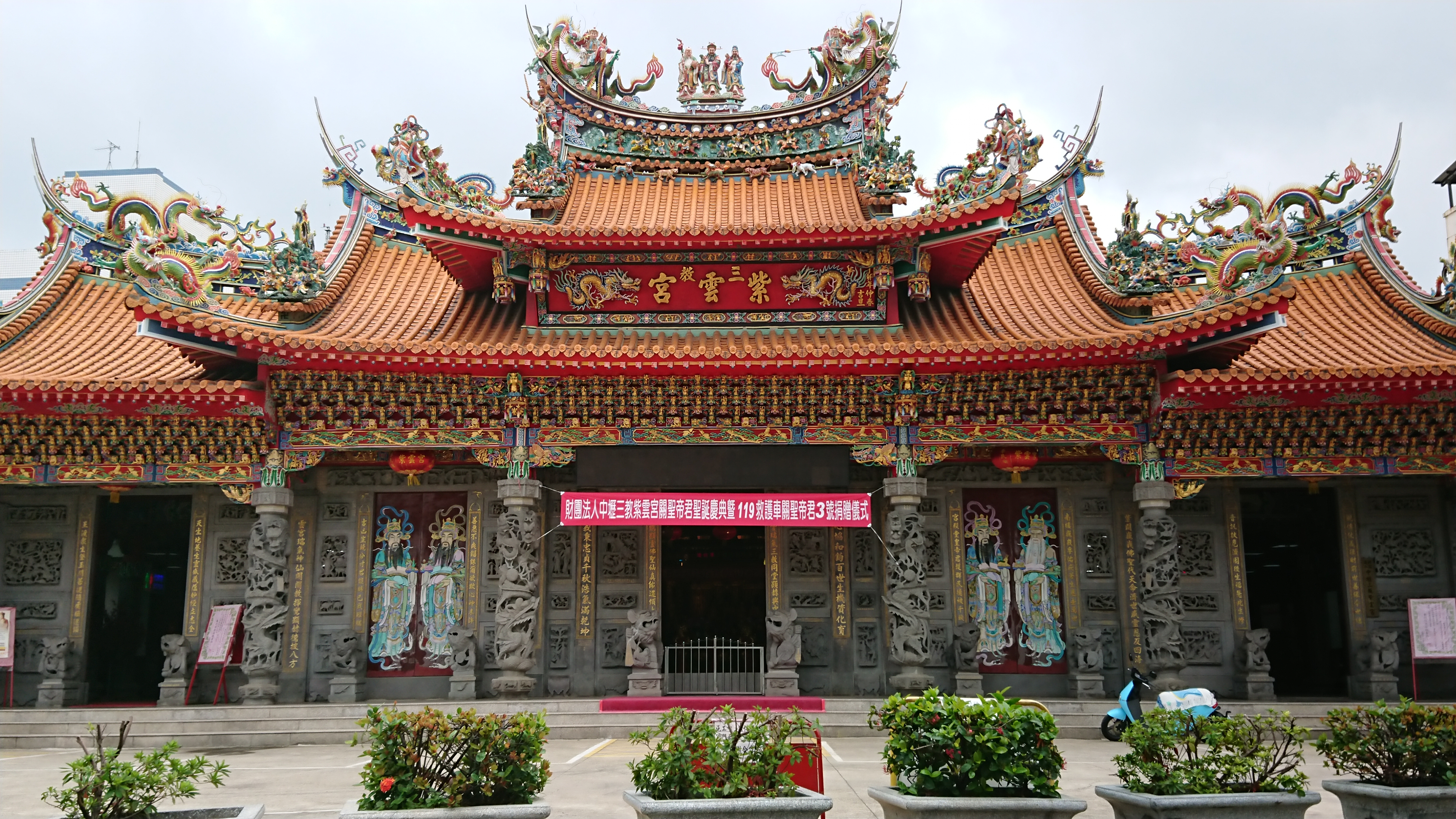 三教紫雲宮廣場